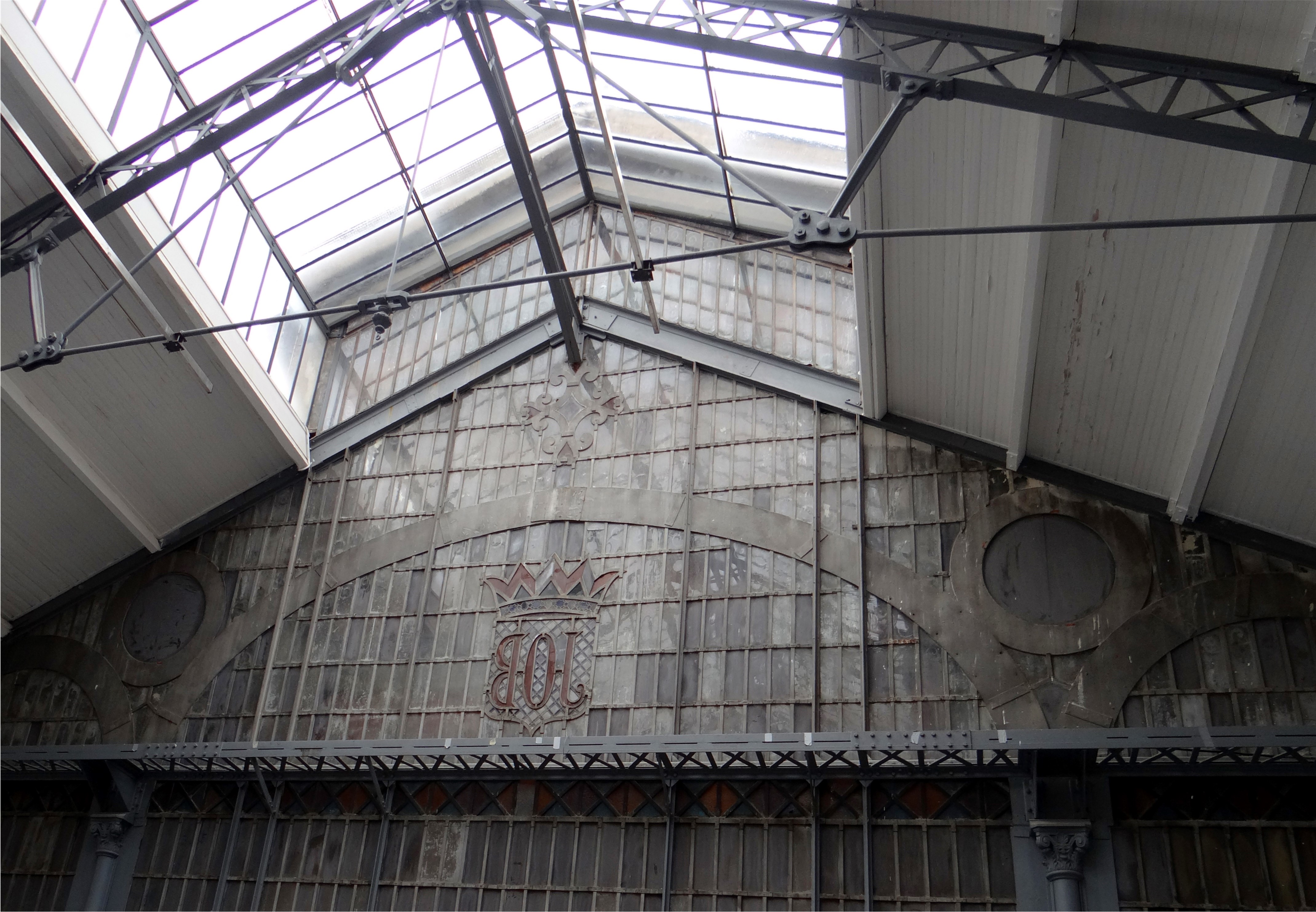 Verrière de l'usine, Hôtel Pams, Perpignan, Pyrénées-Orientales, France. This building is en partie classé, en partie inscrit au titre des Monuments Historiques.